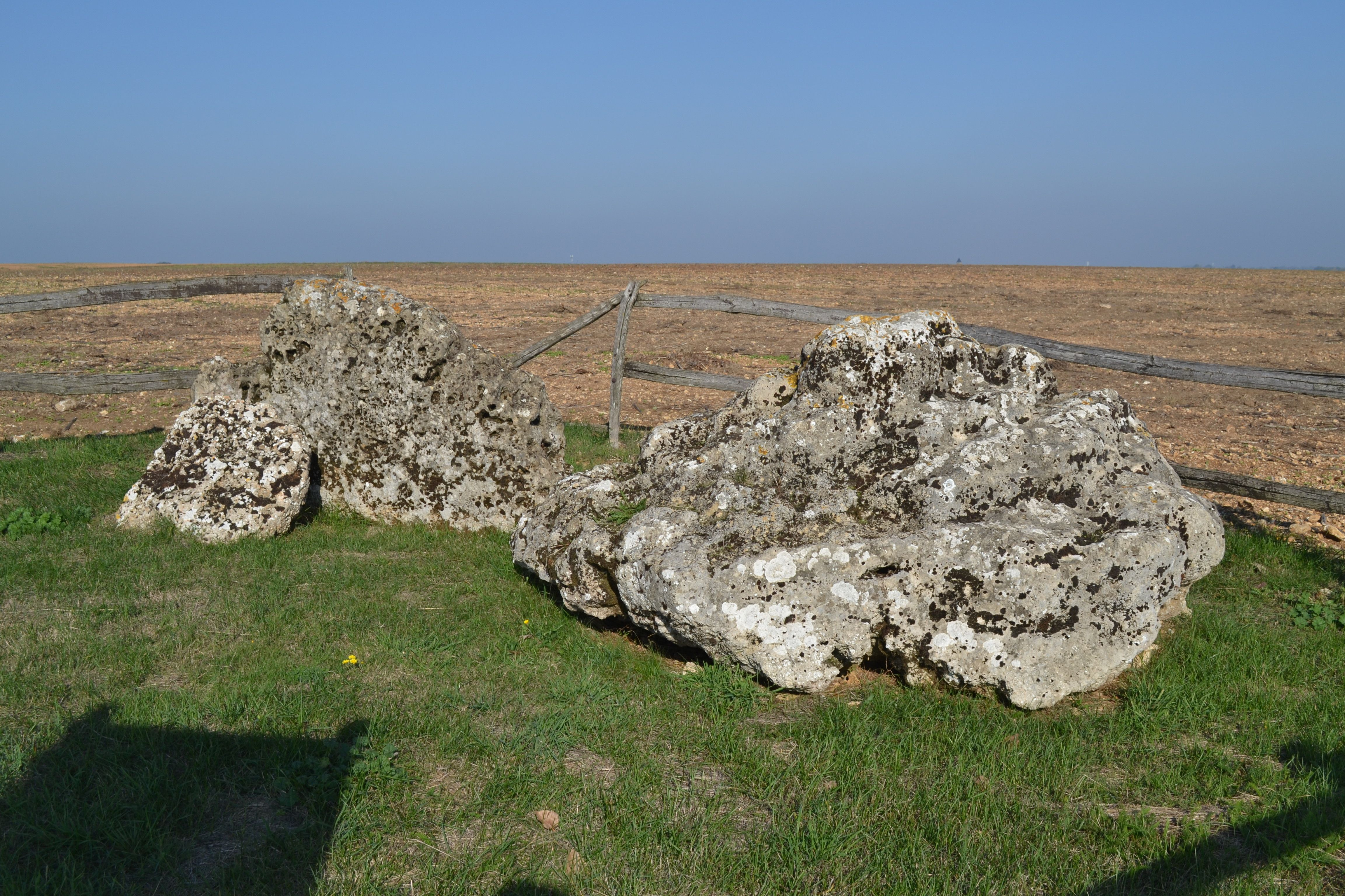 La Pierre-Virante, site mégalithique à Xanton-Chassenon (85).